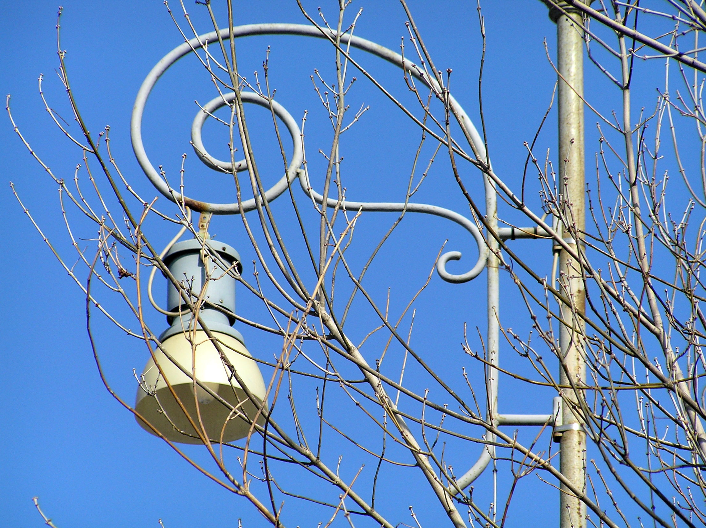 particolare del lampione superstite diquelli che illuminavano il capolinea degli autobus extraurbani di Piazza Cavour di Ancona